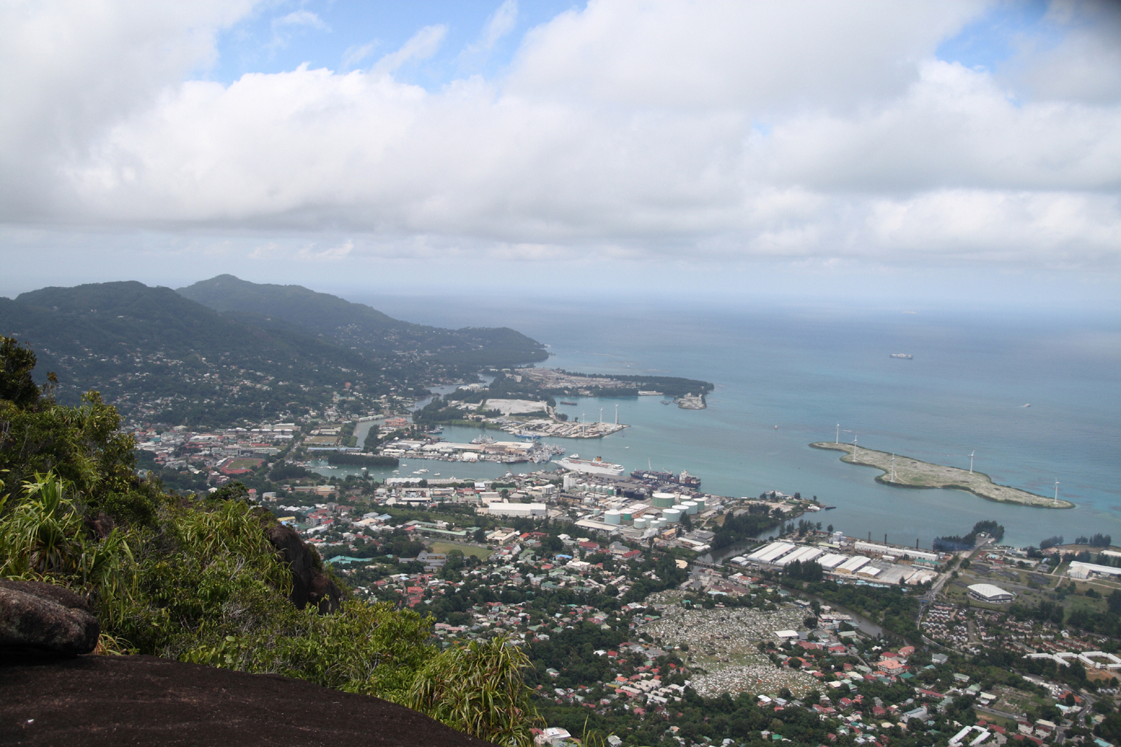 Victoria, Ile de Mahe